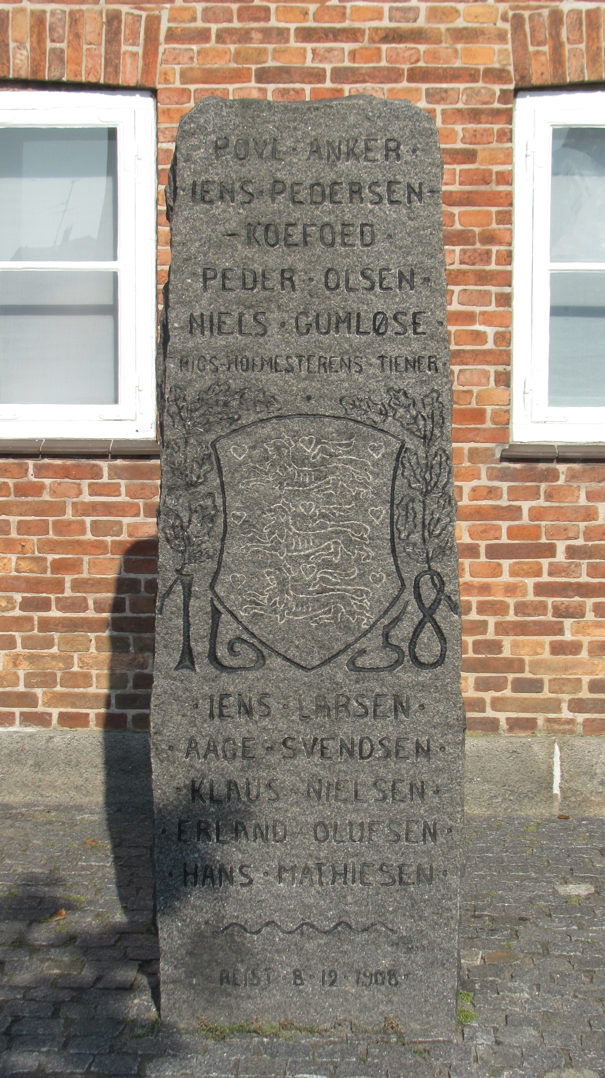 Mindesten pa torvet, Hasle, Bornholm, Danmark